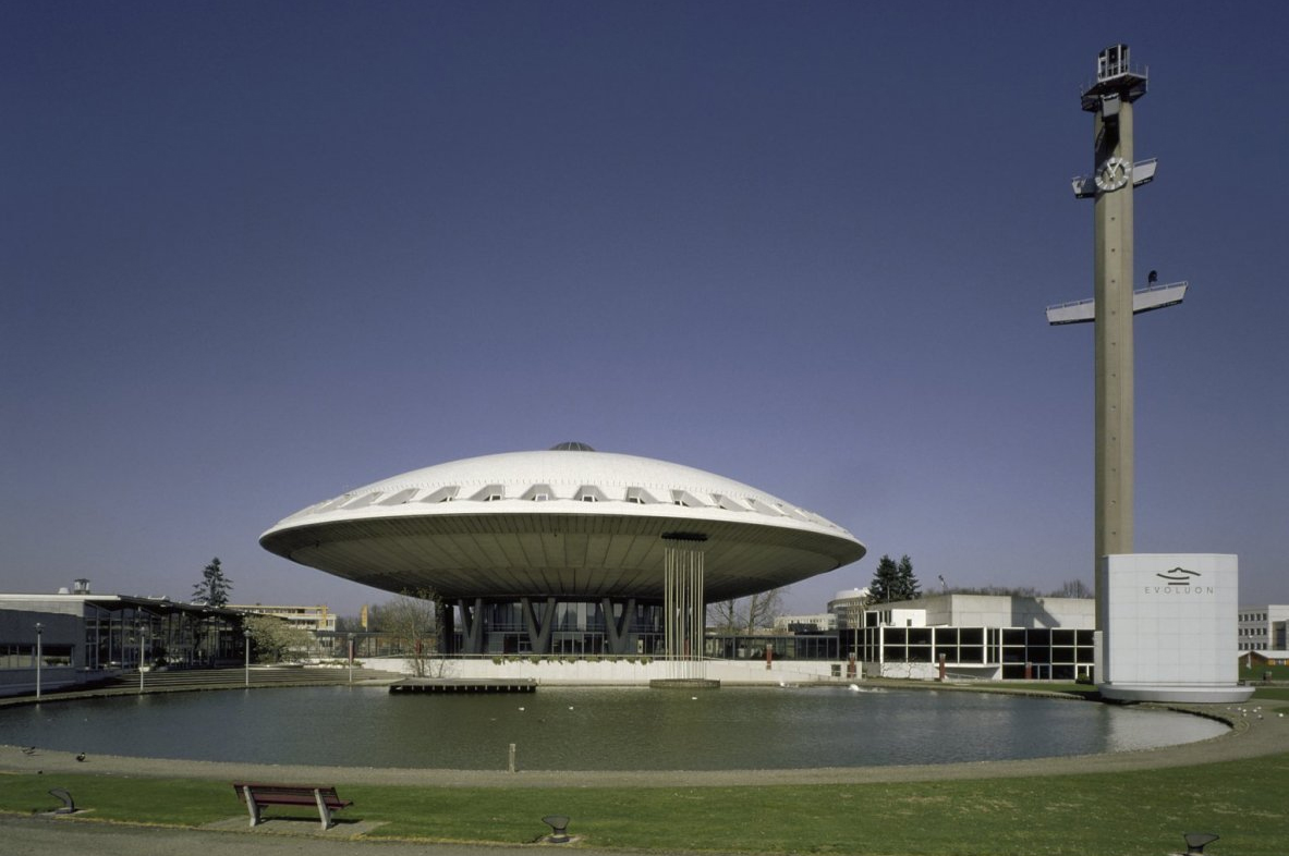 Evoluon: Overzicht (opmerking: Gefotografeerd voor Toonbeelden van de Wederopbouw)